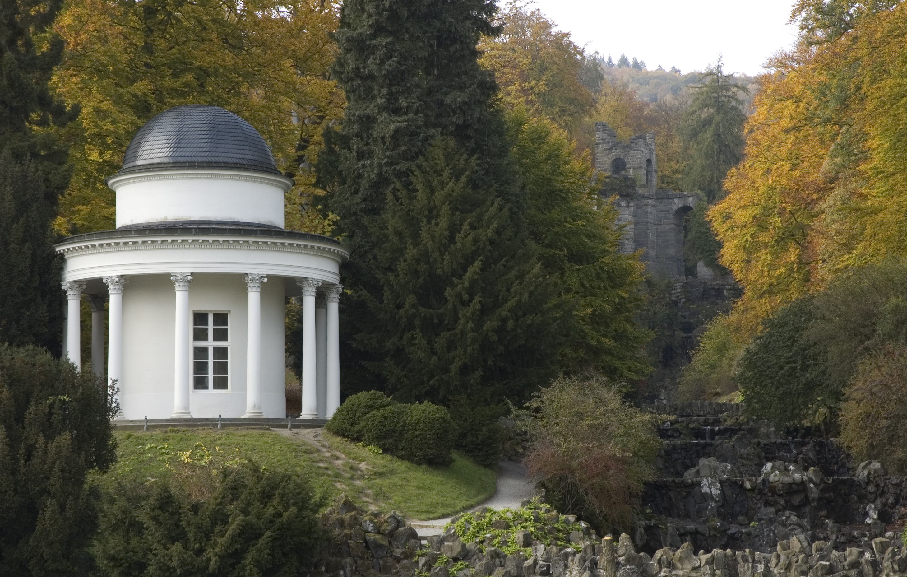 Kassel - Park Wilhelmshöhe